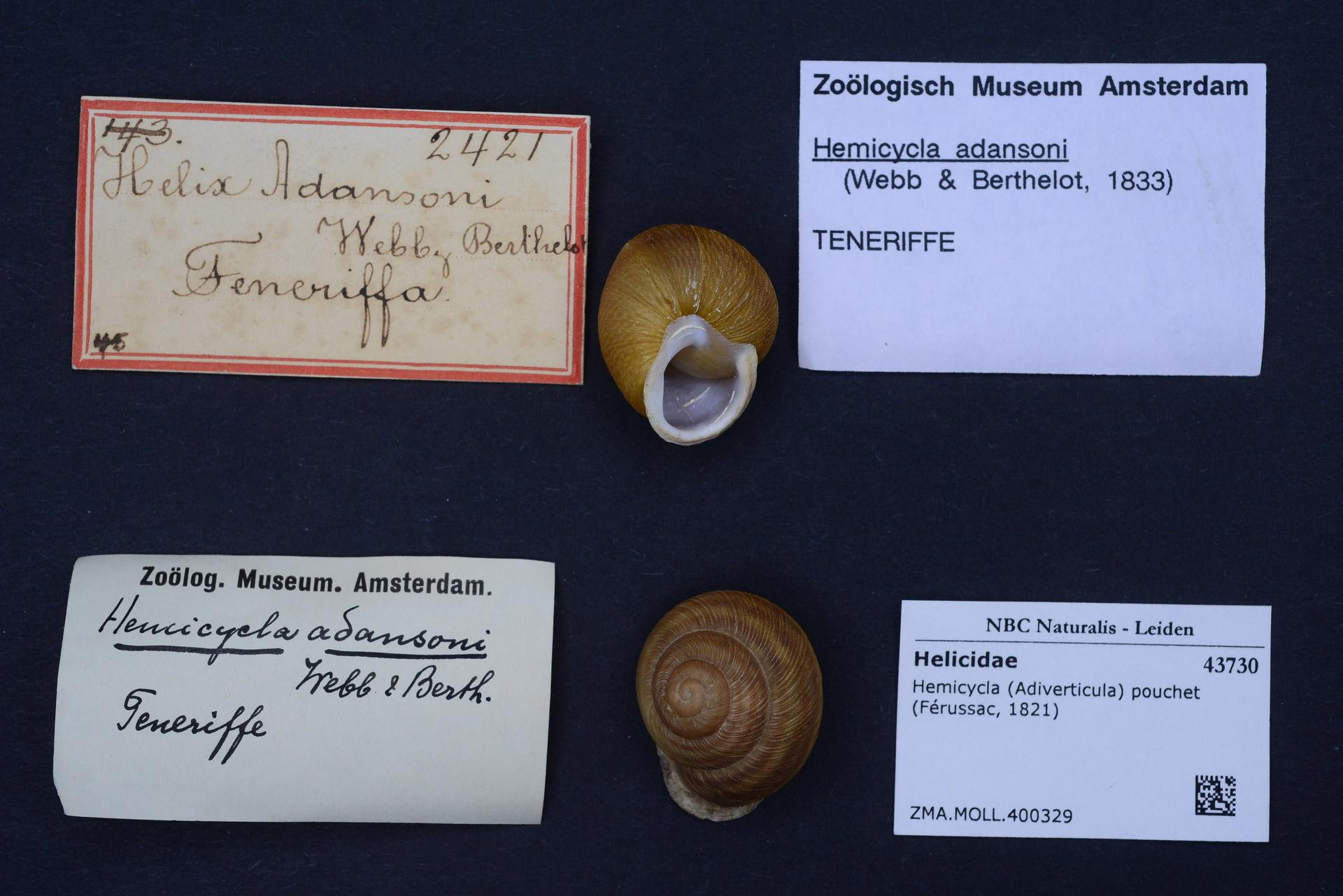 Hemicycla (Adiverticula) pouchet (Férussac, 1821)